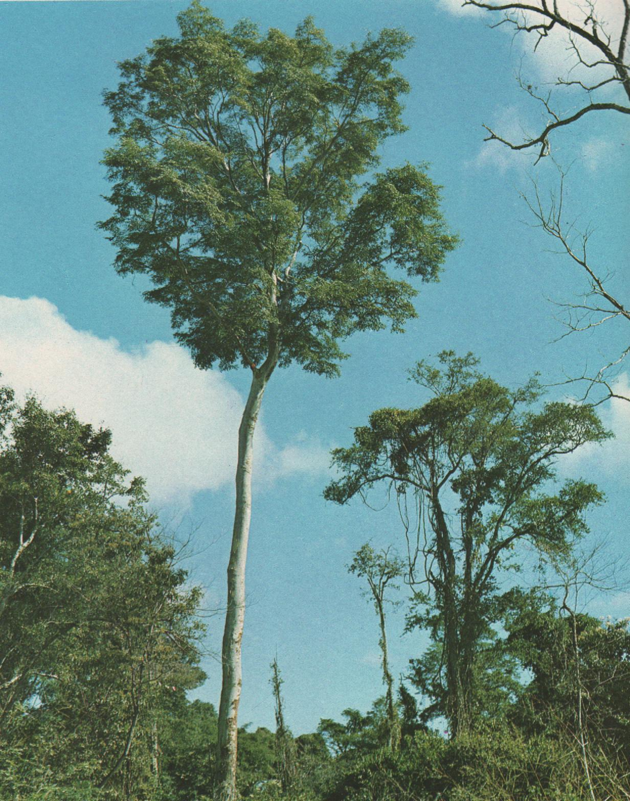 Ejemplar de Amburana cearensis, en Argentina.